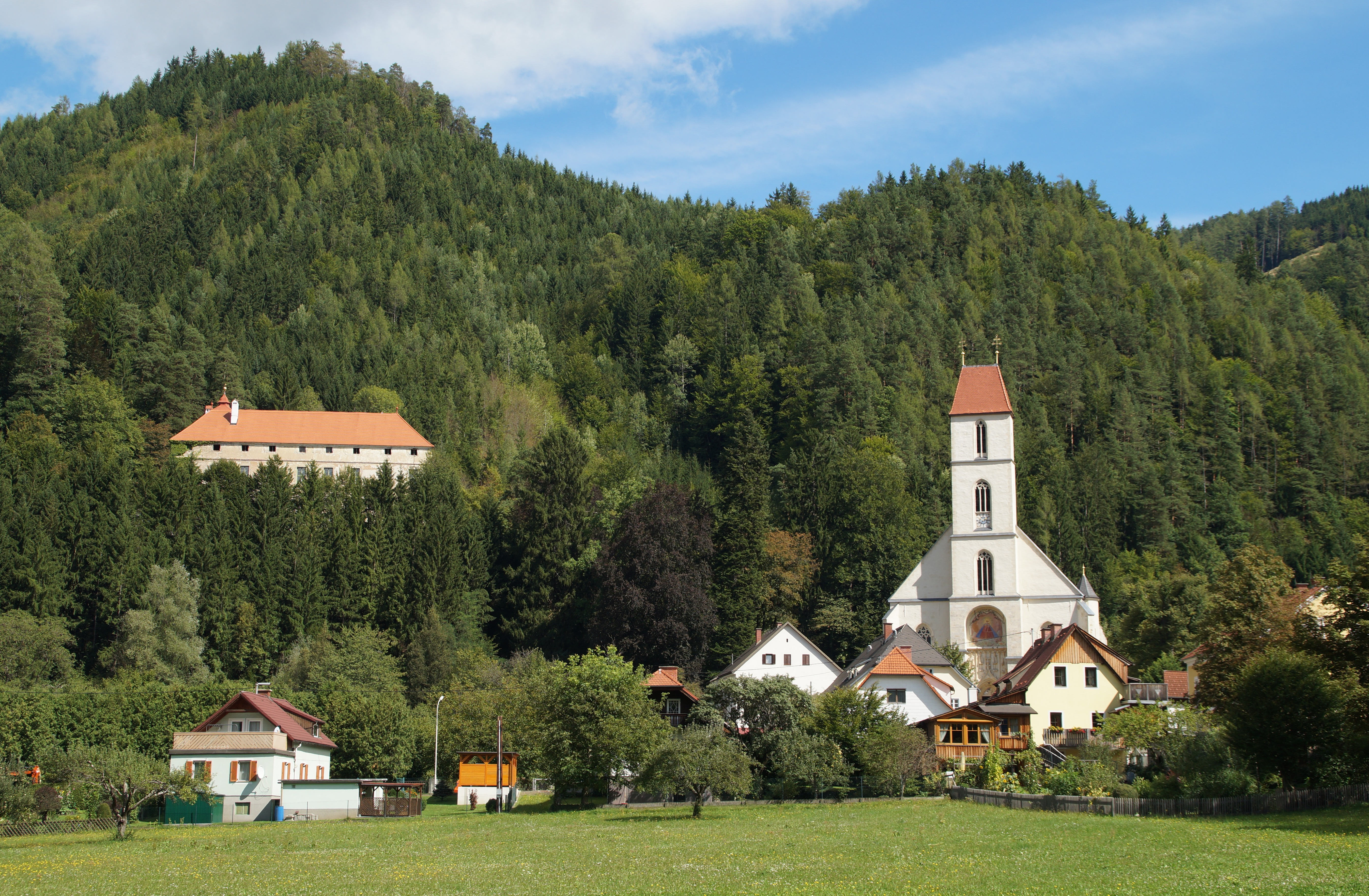 Frauenkirche und Schloss Pernegg